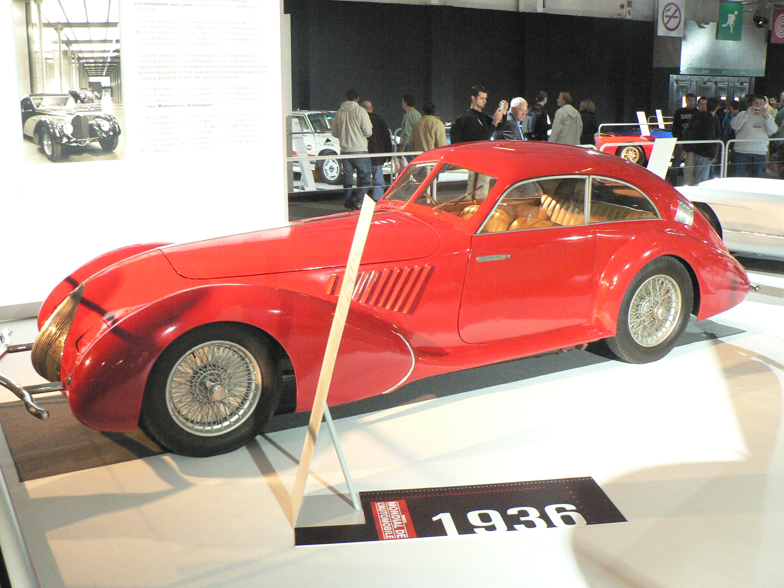 Mondial de l automobile de Paris (October 2006)